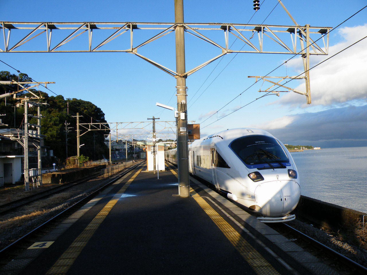 JR九州長崎本線小長井駅ホーム